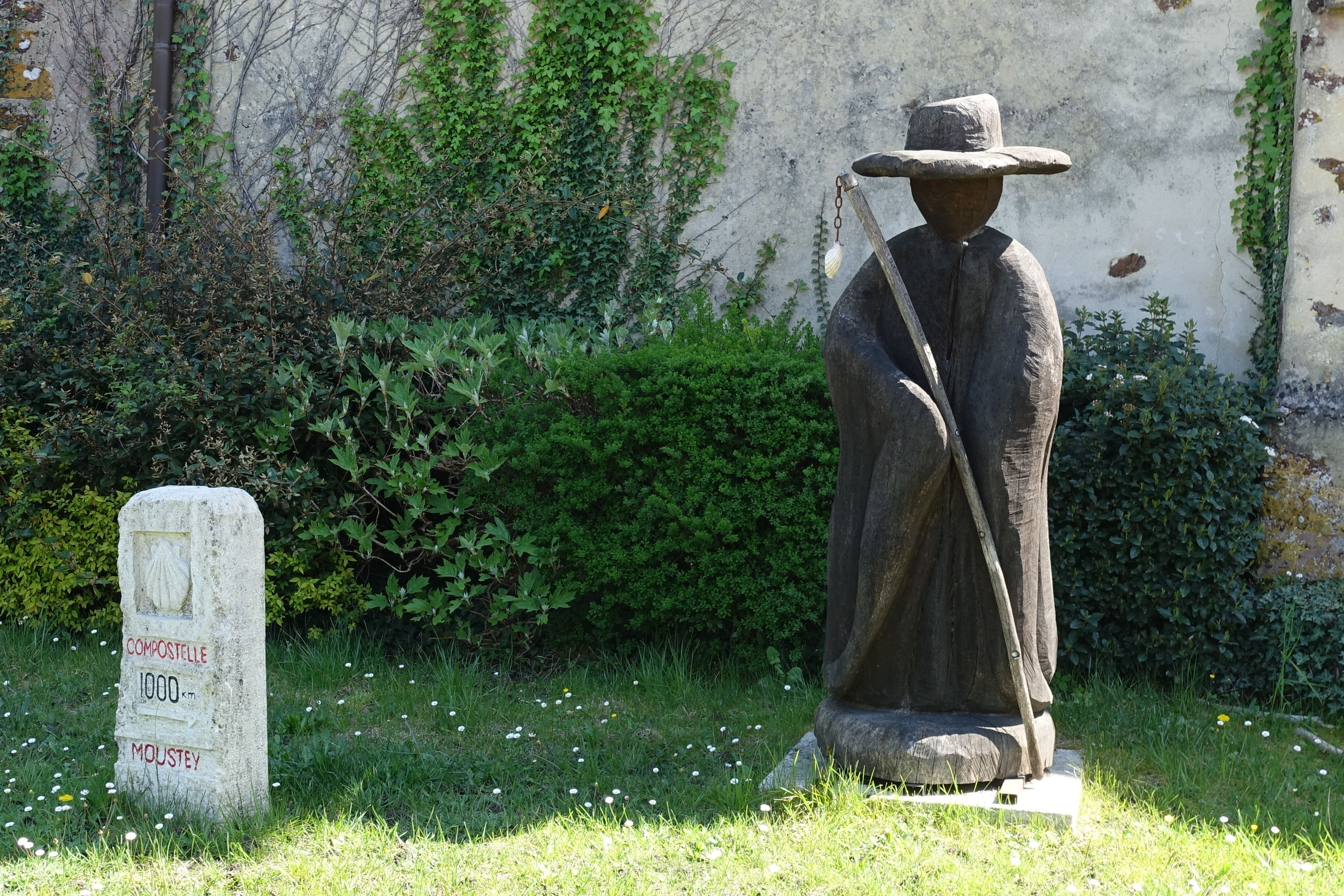 pèlerin en bois de Saint-Jacques de Compostelle et borne marquant les 1000 kilomètres restant à parcourir jusqu'à Santiago, devant l'église Notre-Dame de Moustey (Landes)